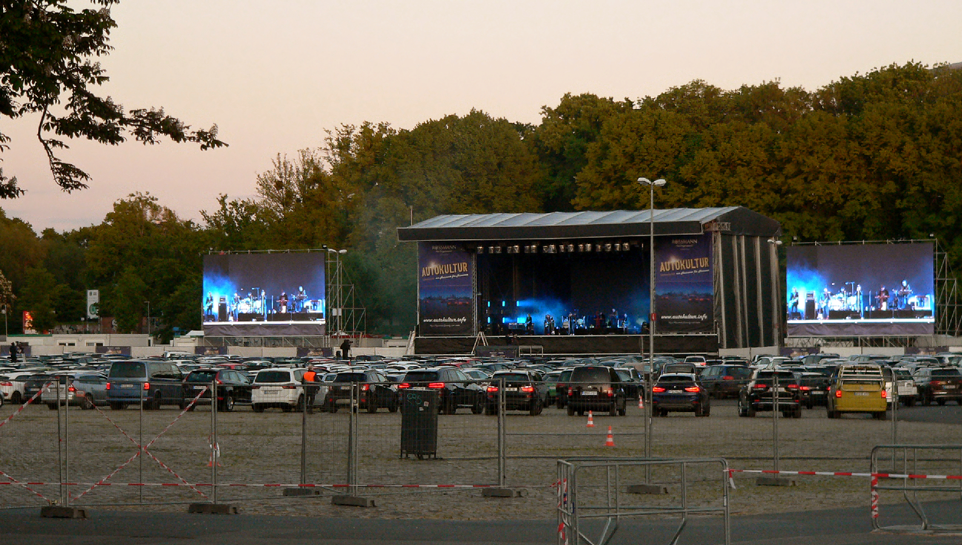 Autokultur mit Konzertveranstaltung in Hannover auf dem Schützenplatz